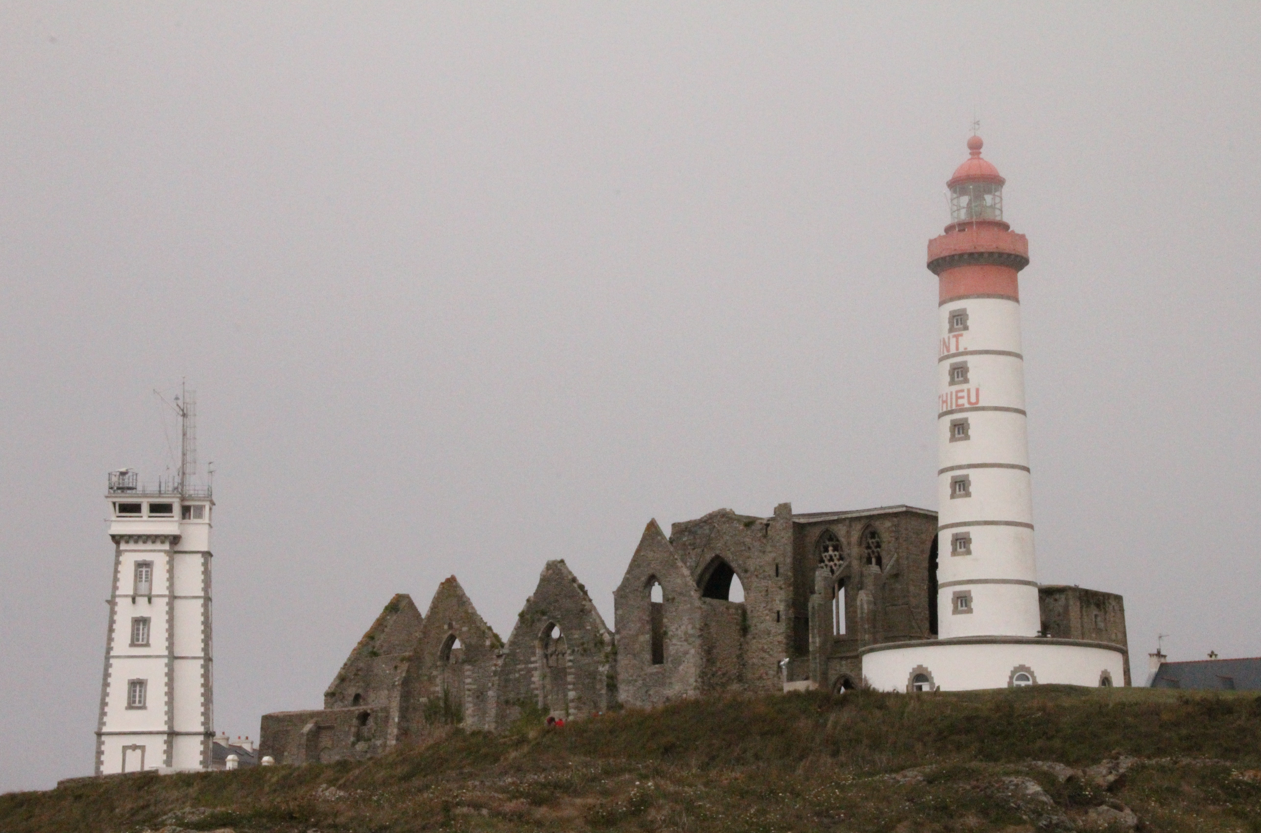 Phare et ruine du monastère .